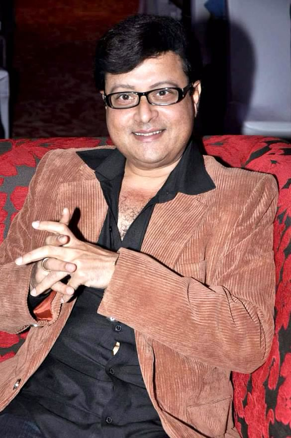 Sachin Pilgaonkar at 'Kahta Hai Poet' launch